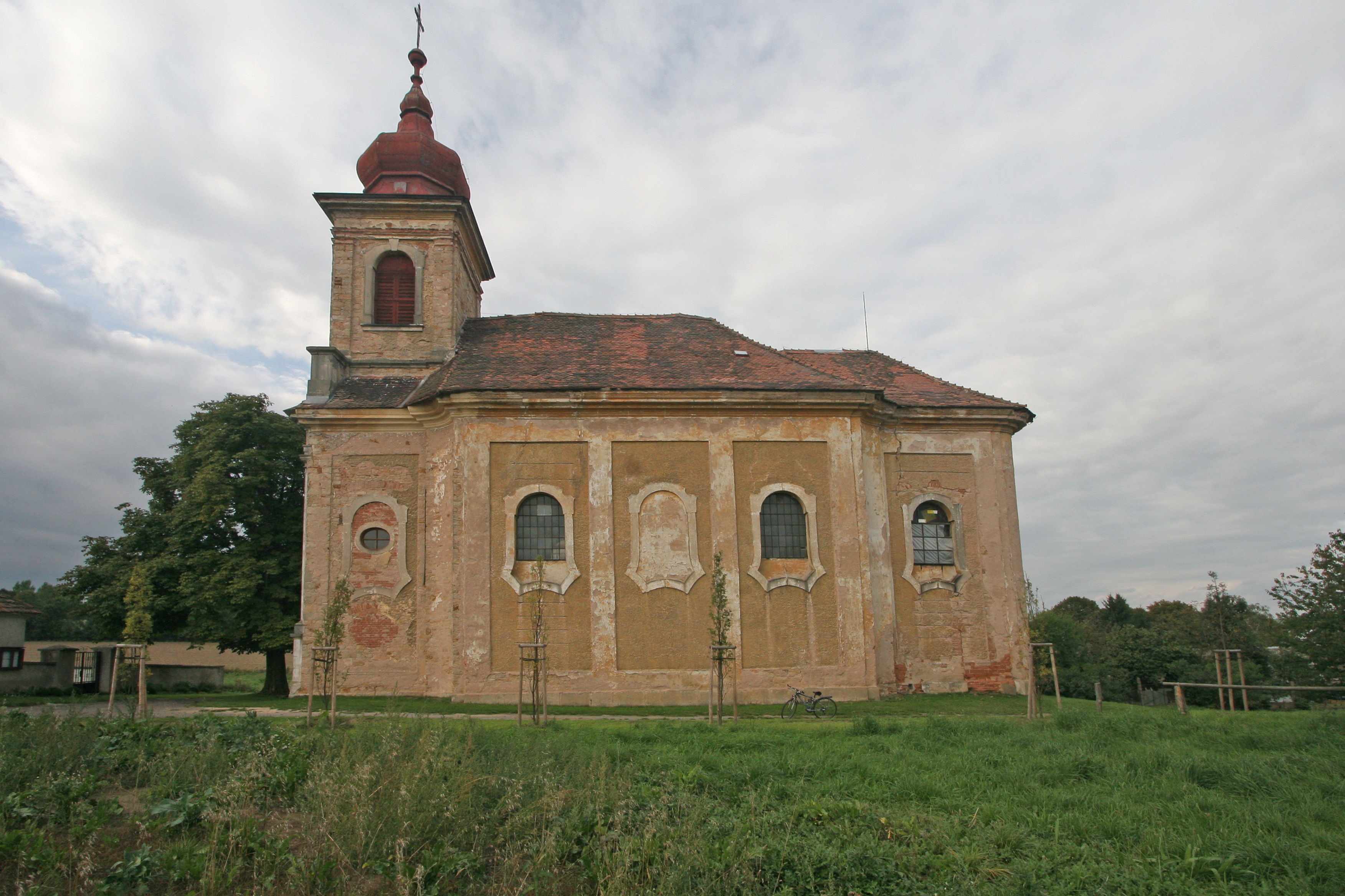 Kostel sv. Mikuláše (Žíželeves), Žíželeves